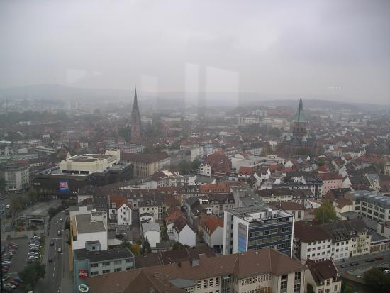 Larger image of Kaiserslautern.